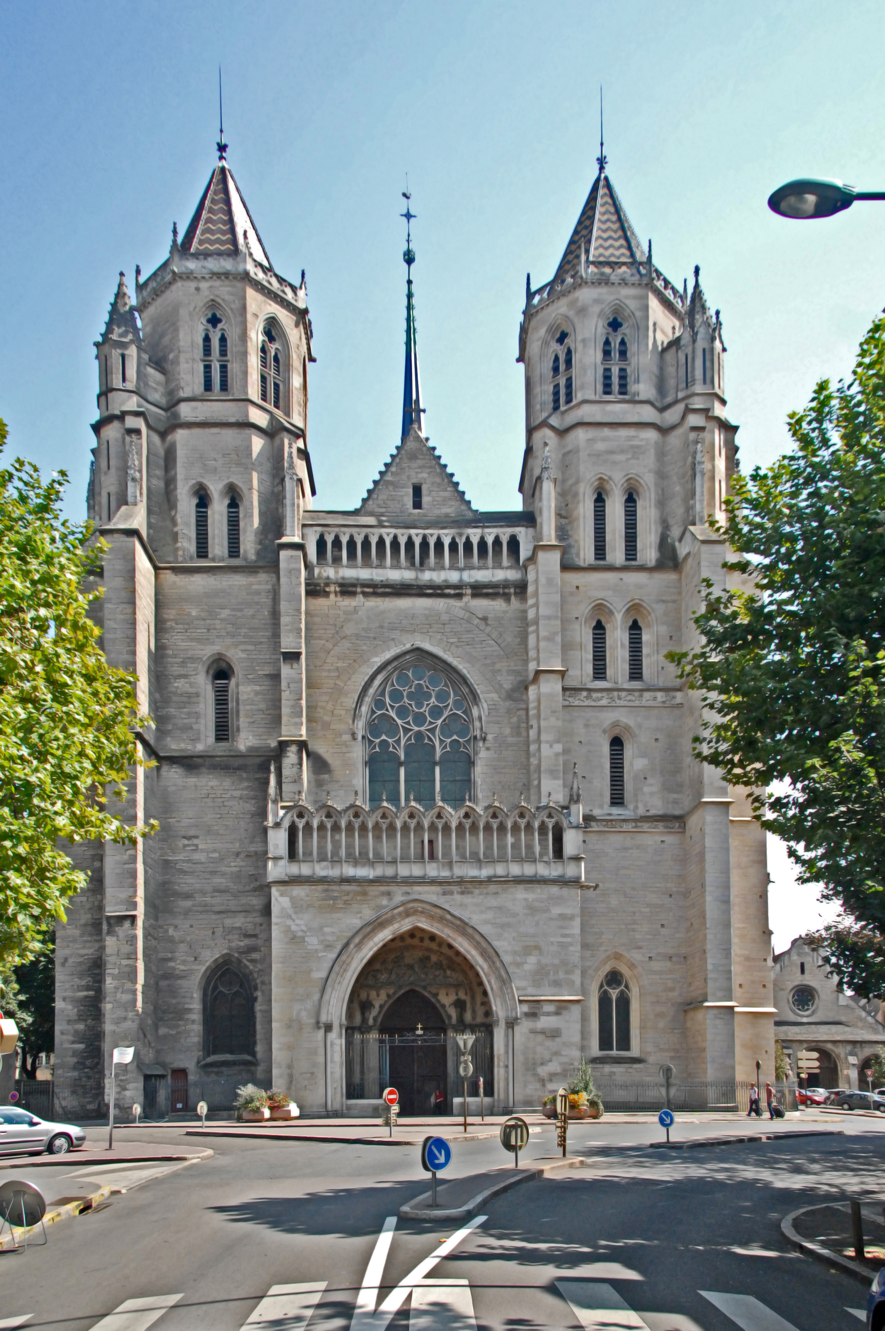 St-Bénigne Dijon, Westwerk von W